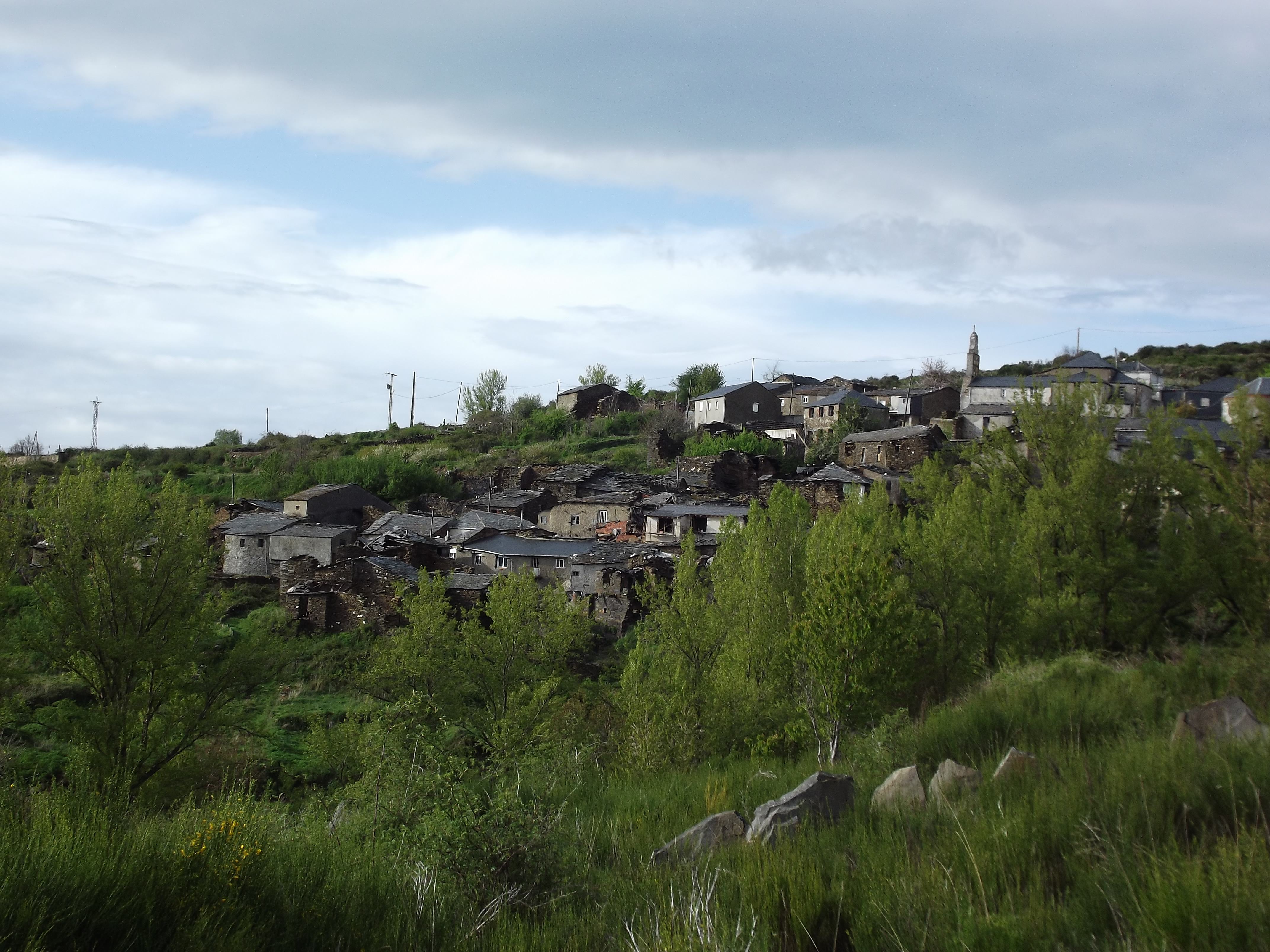 Lardeira en Carballeda de Valdeorras.